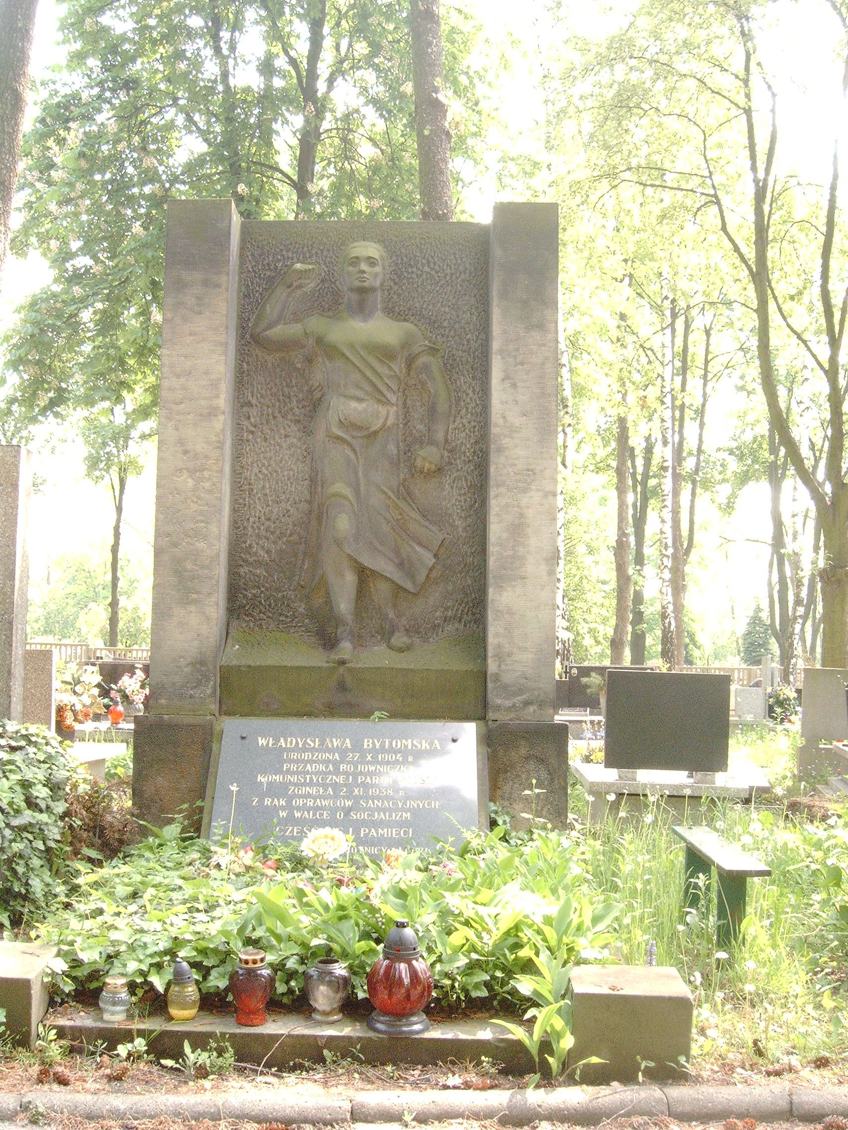 Grób Władysławy Bytomskiej na cmentarzu komunalnym na Dołach w Łodzi